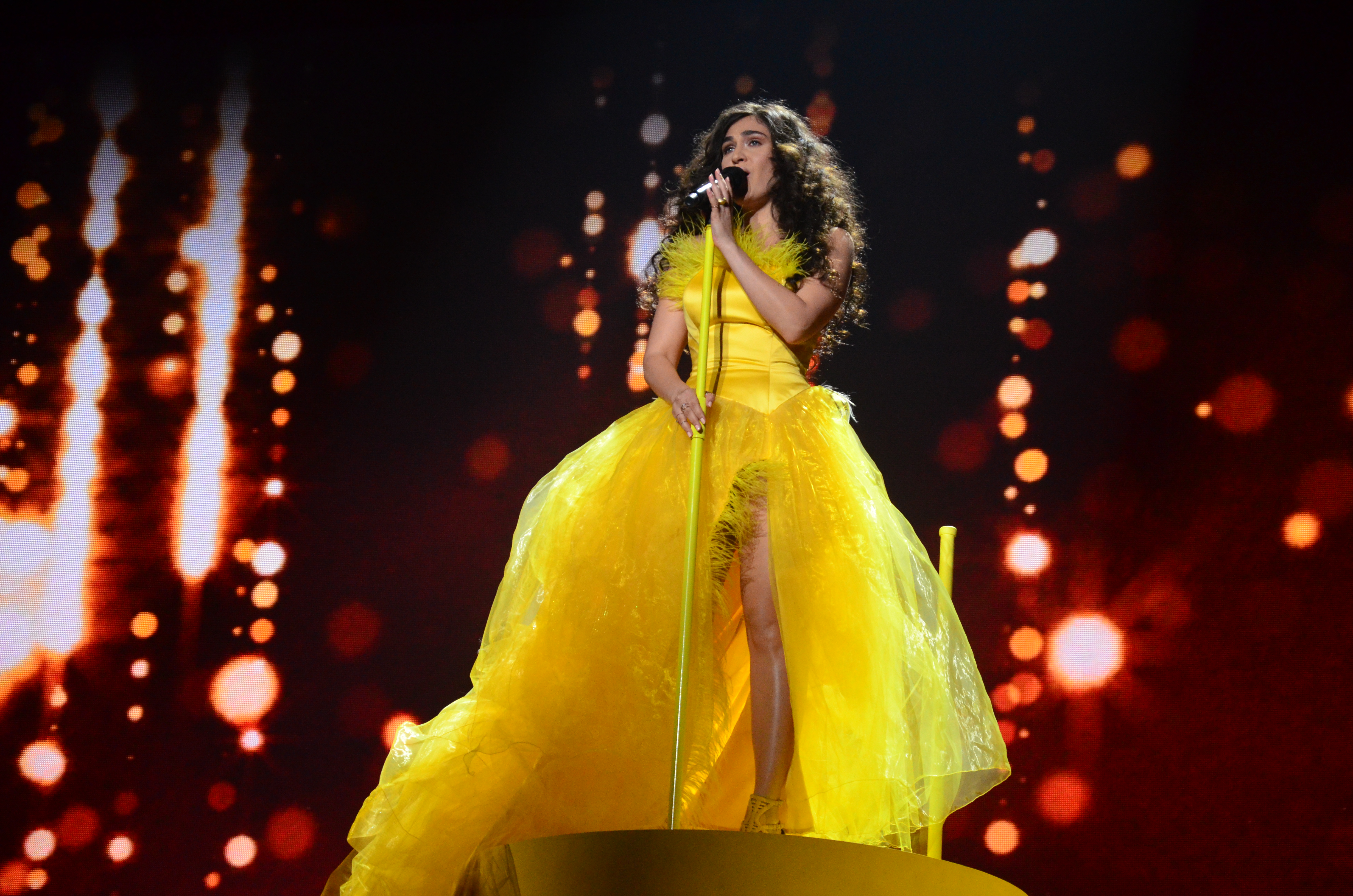 10 травня 2017 року у Києві відбулась генеральна репетиція 2 півфіналу "Євробачення".